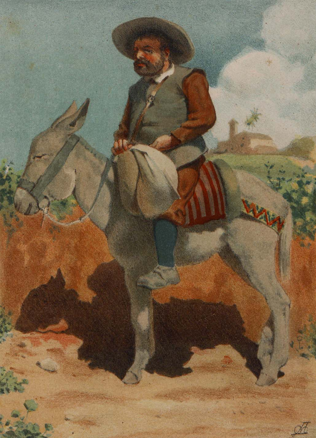 Sancho Panza.